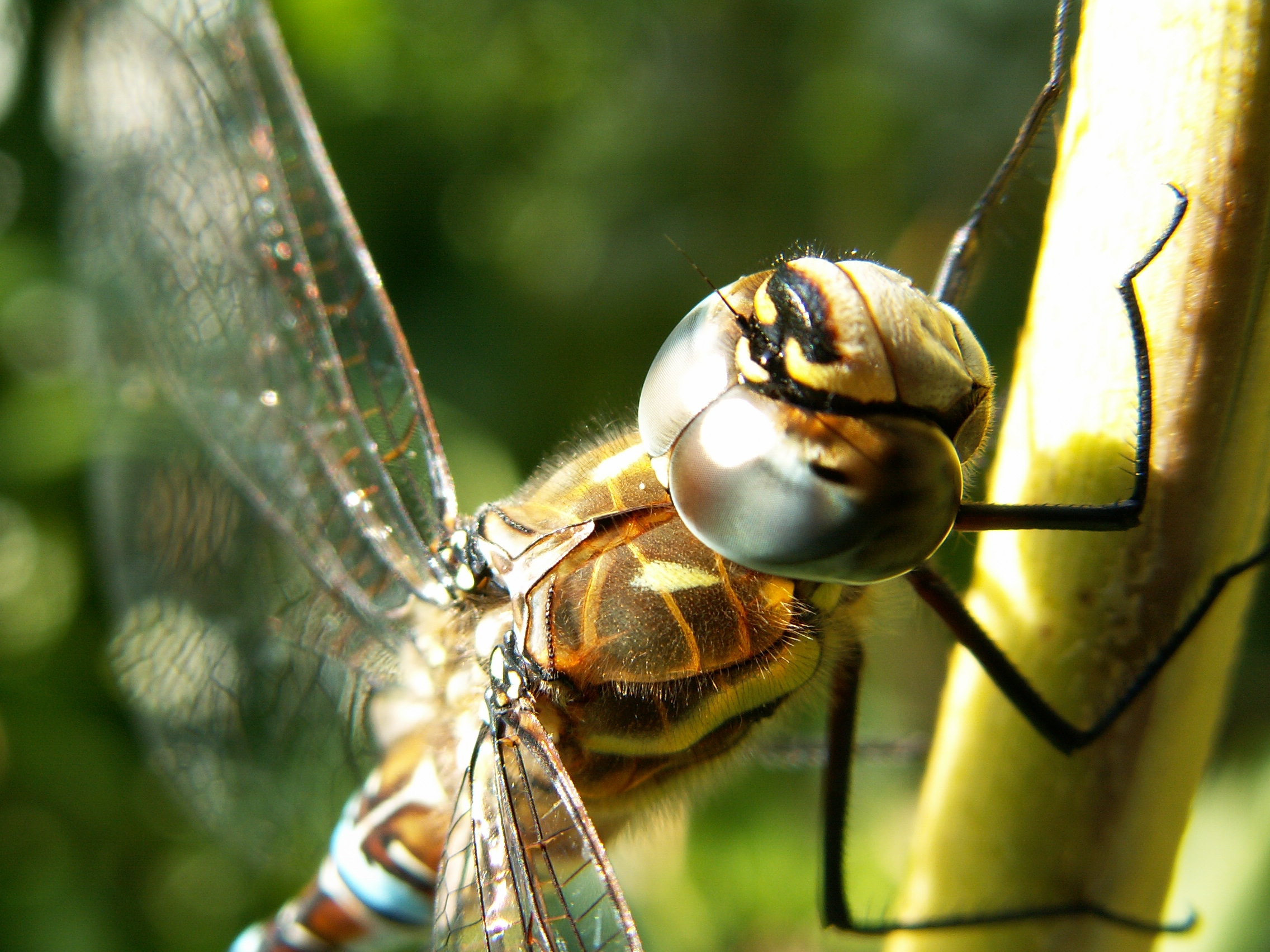 Aeshna mixta head